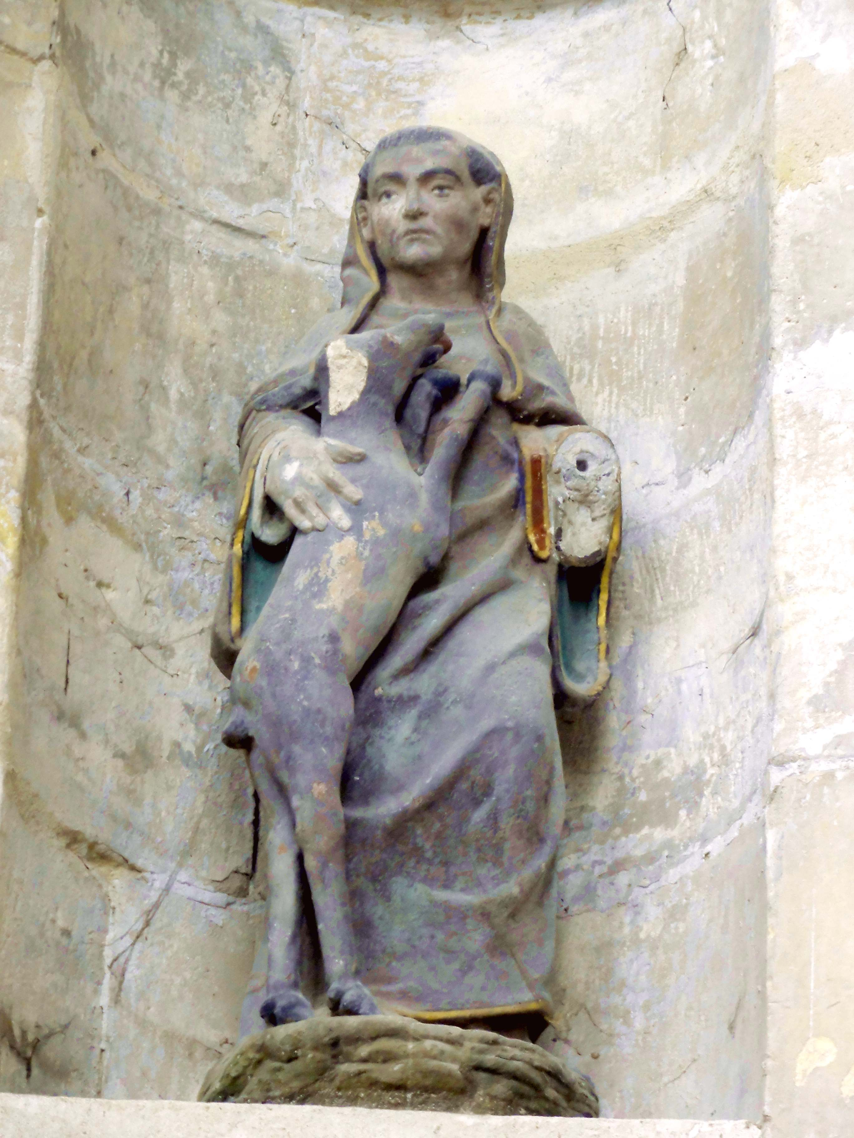 Abside, statue de saint Gilles l'Ermite XVe s.